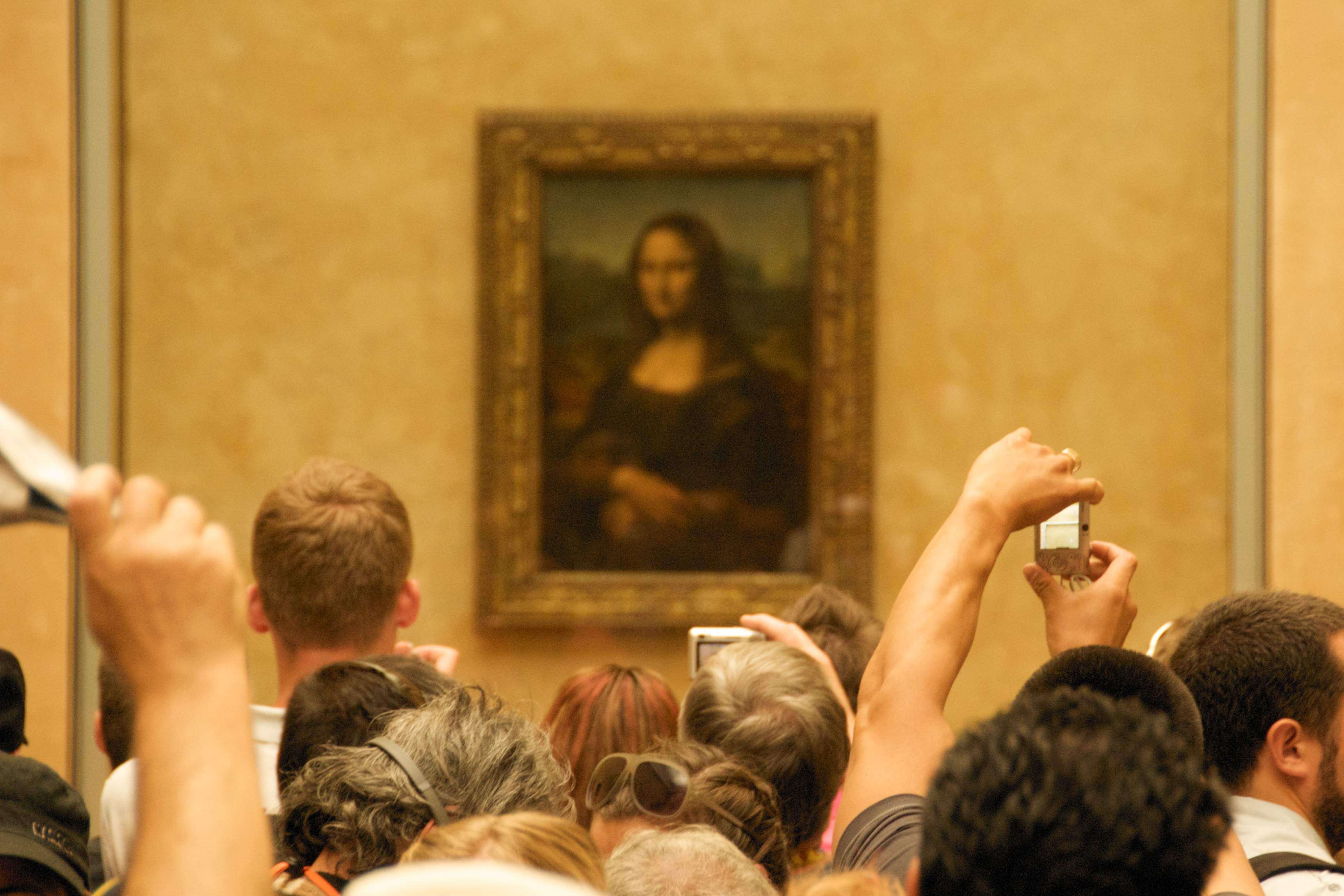 Mona Lisa suck